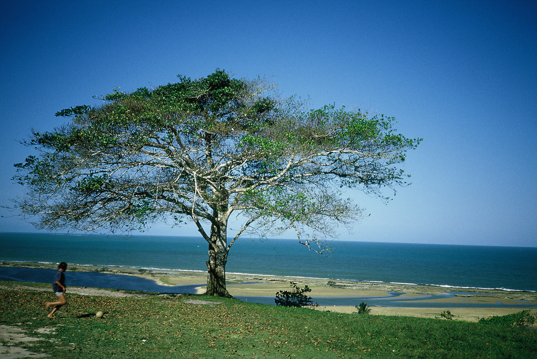 Santa Cruz de Cabralha, Bahia, Brasilien